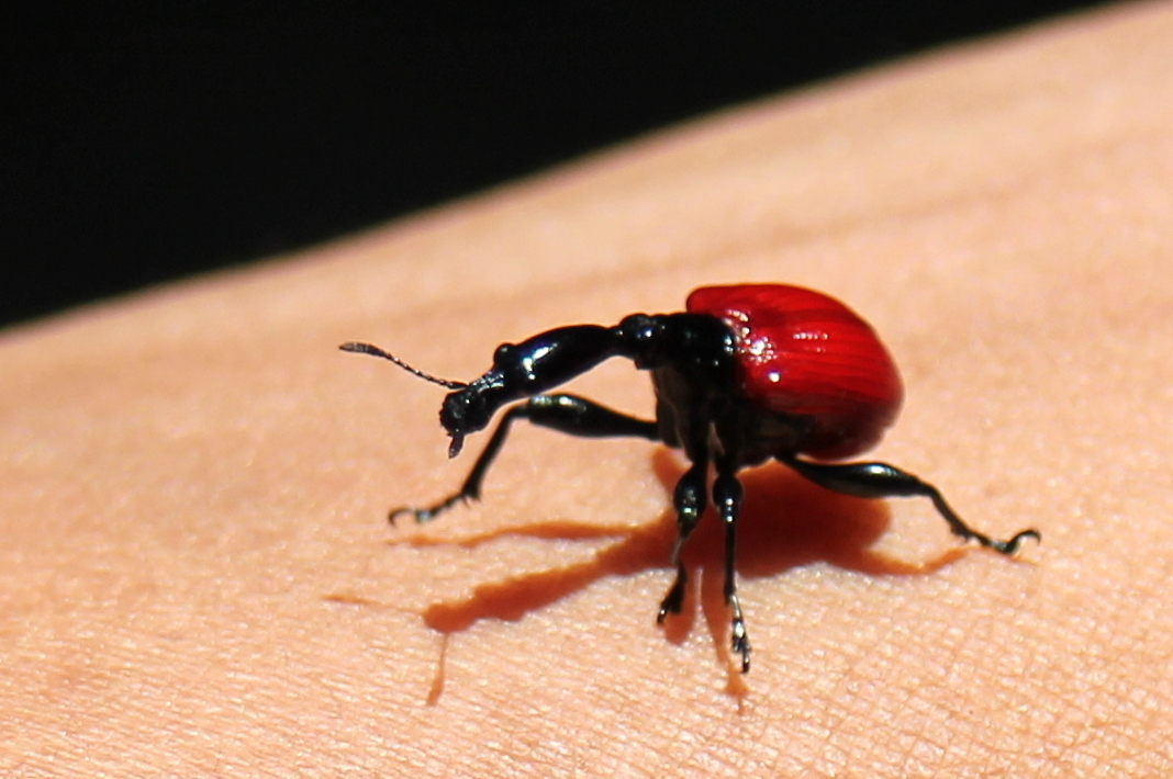 Trachelophorus giraffa, Andasibe